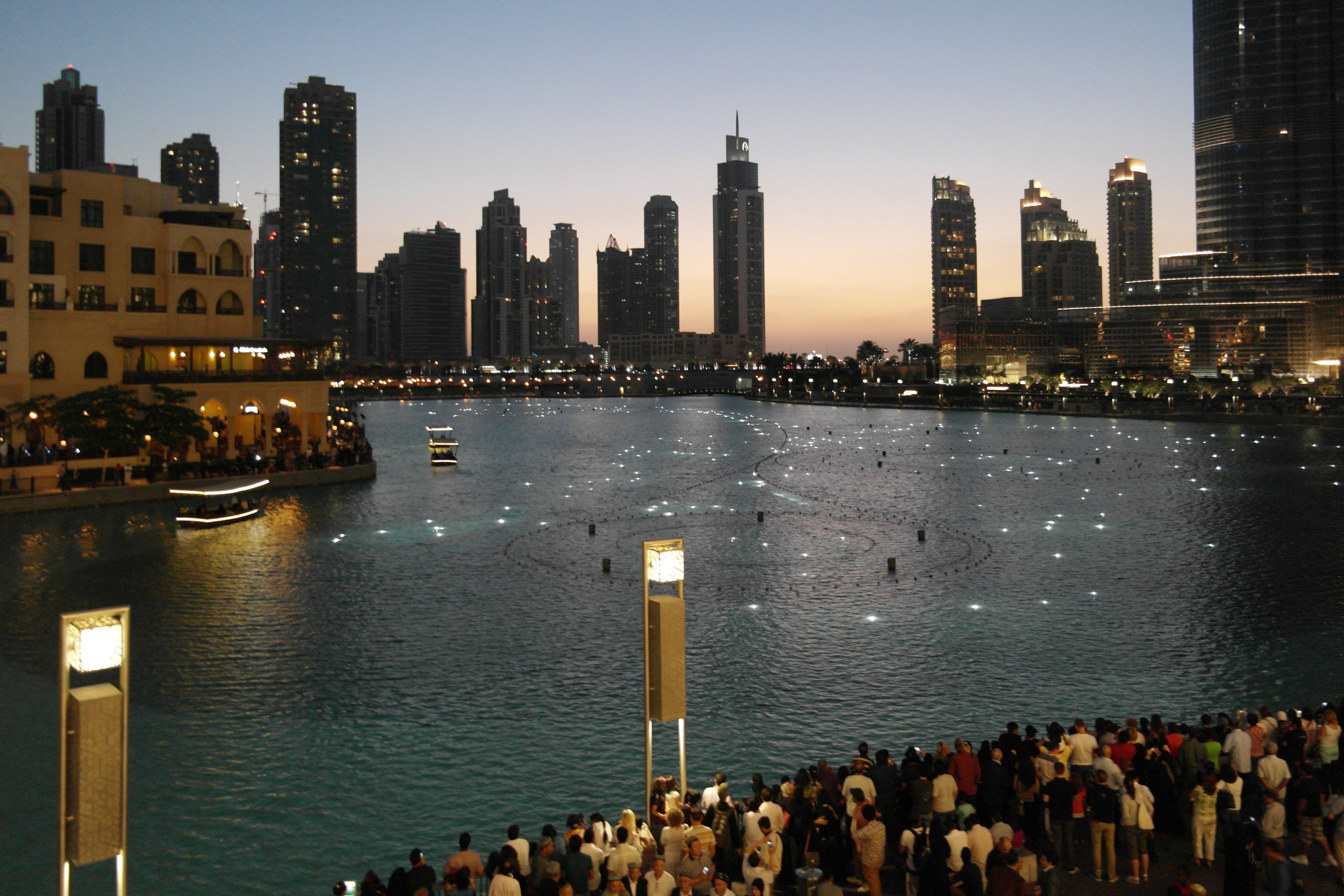 Burj Khalifa lake